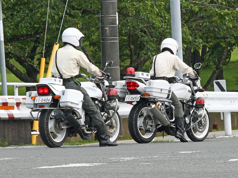 警務隊用オートバイ富士駐屯地前で撮影した警務隊用オートバイ。手前がホンダCB400SF、奥がヤマハXJR400R。